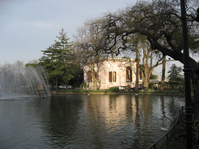 Çadır Kiosk